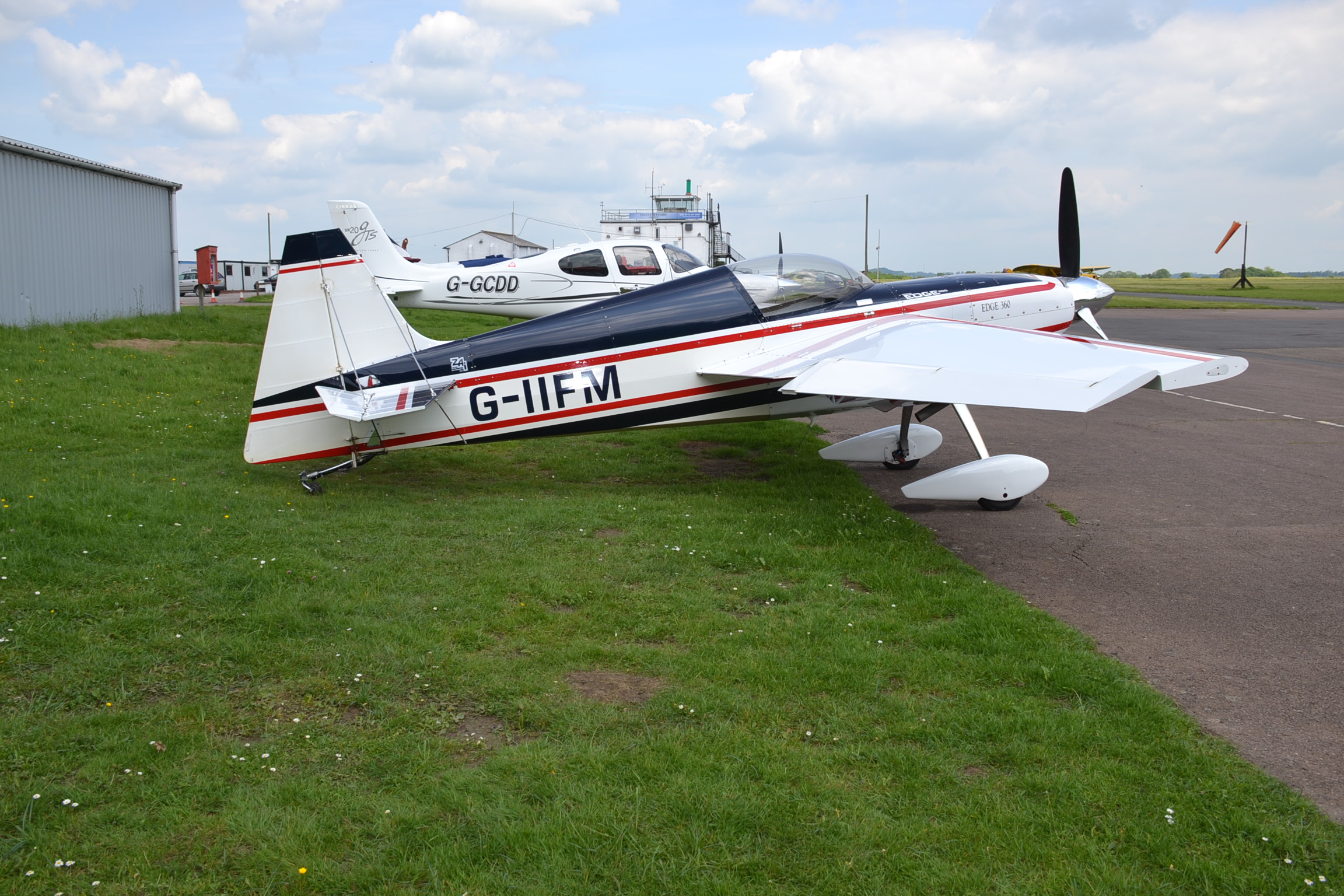 Zivko Edge-360 at Leicester,01/06/14.